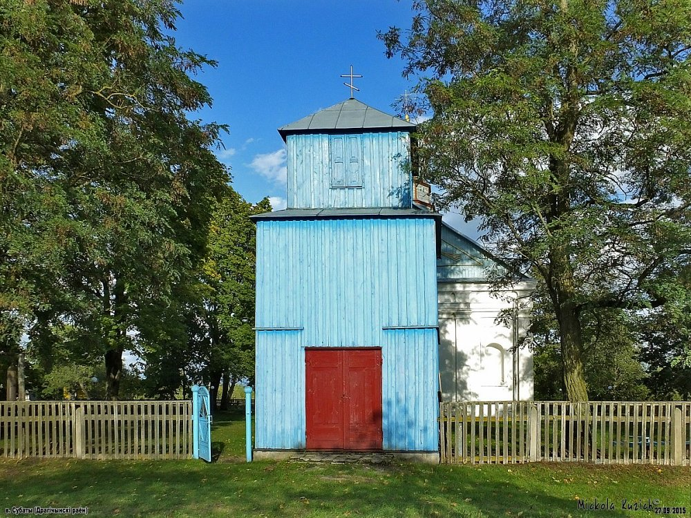 Субаты. Свята-Раства-Багародзіцкая царква. Званіца